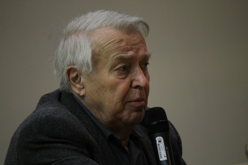 Pavel Kohout na diskuzi na VŠE.